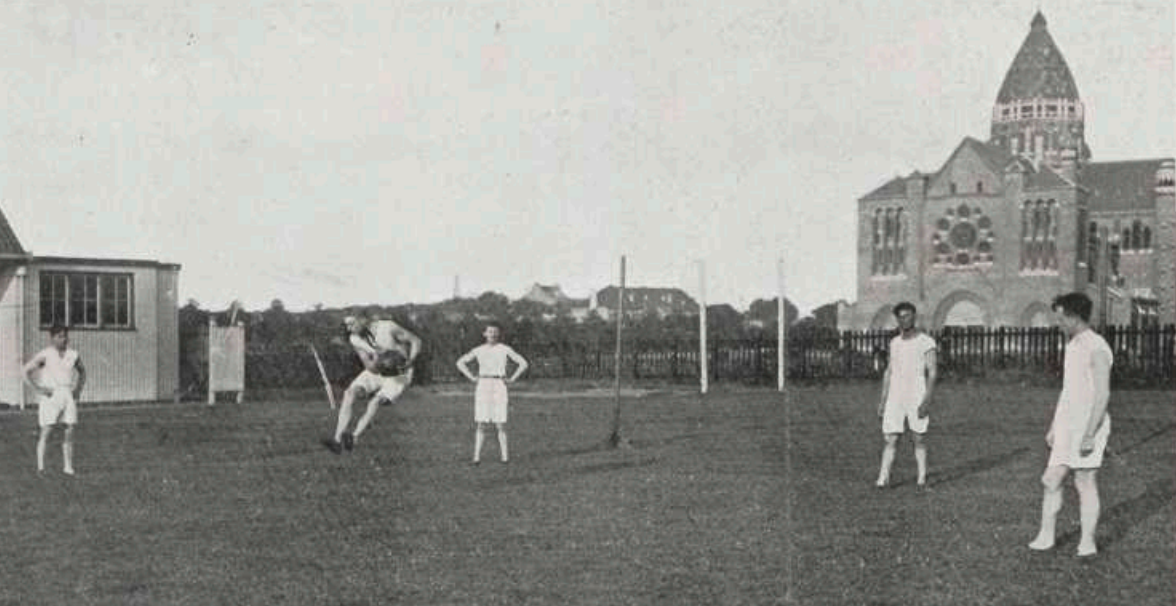 Afbeelding ter illustratie bij artikel over slingerbal in De revue der sporten, jaargang 15, 1921/1922, nr 51, 23-08-1922